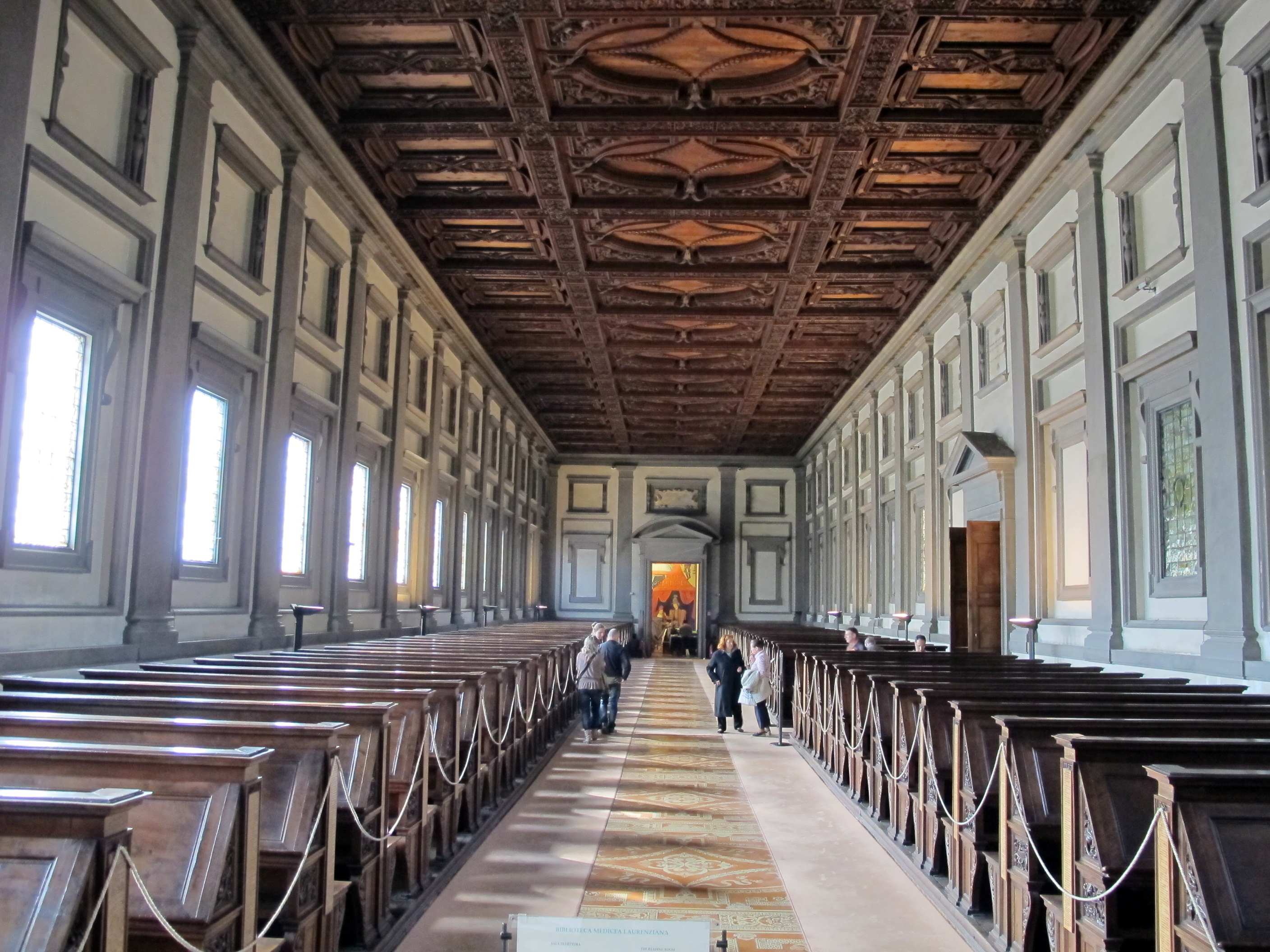 Biblioteca laurenziana, sala lettura